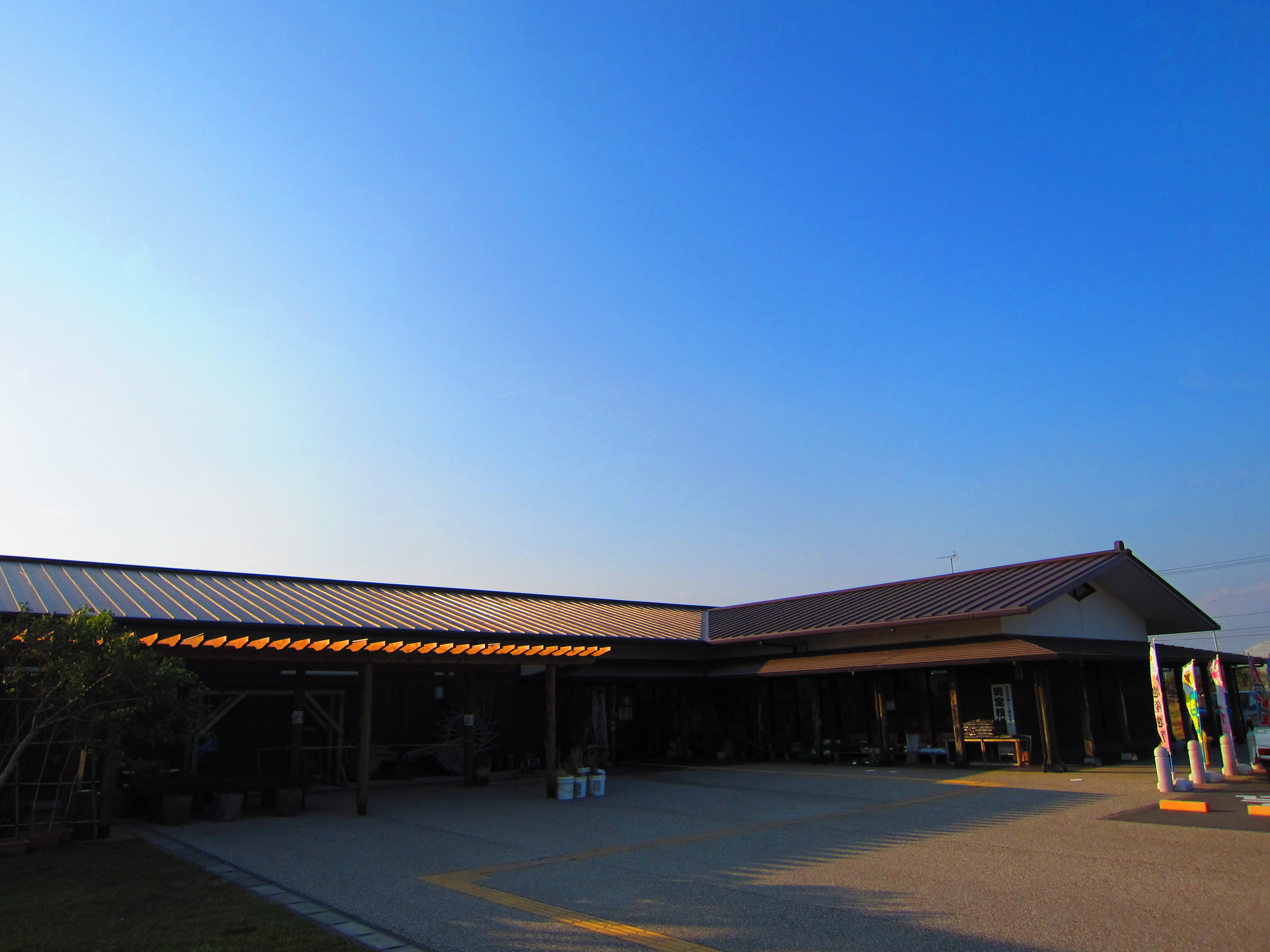 Yamazaki, Kakegawa, Shizuoka Prefecture 437-1305, Japan